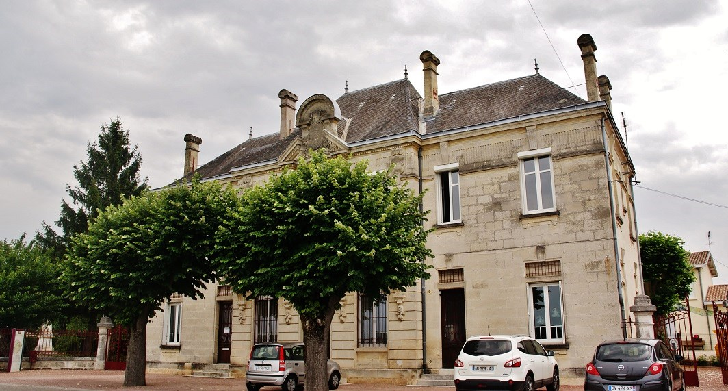 La Mairie